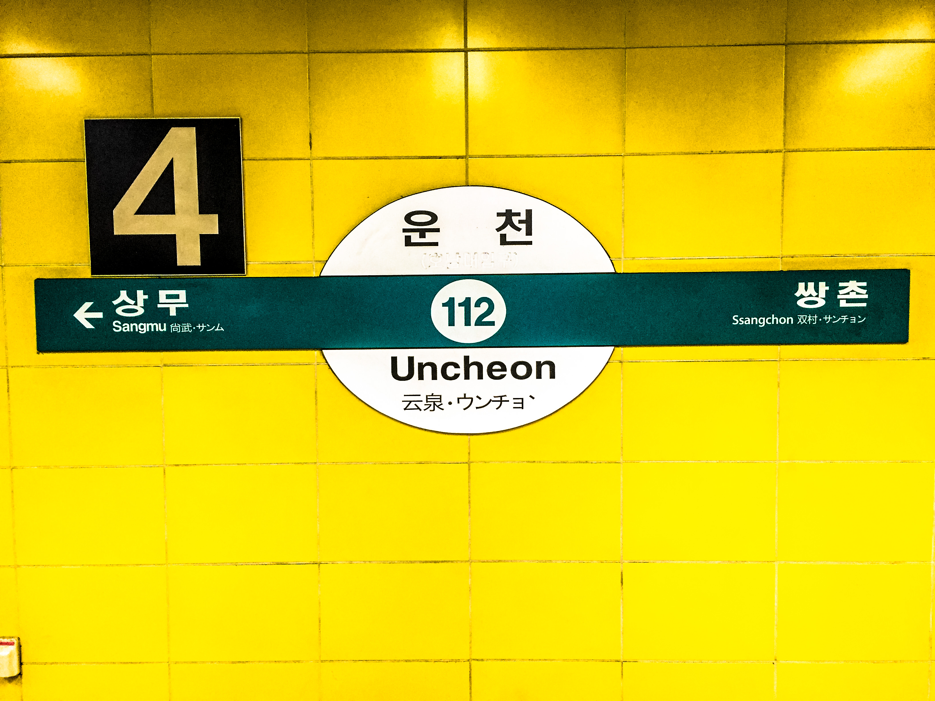 운천역 역명판